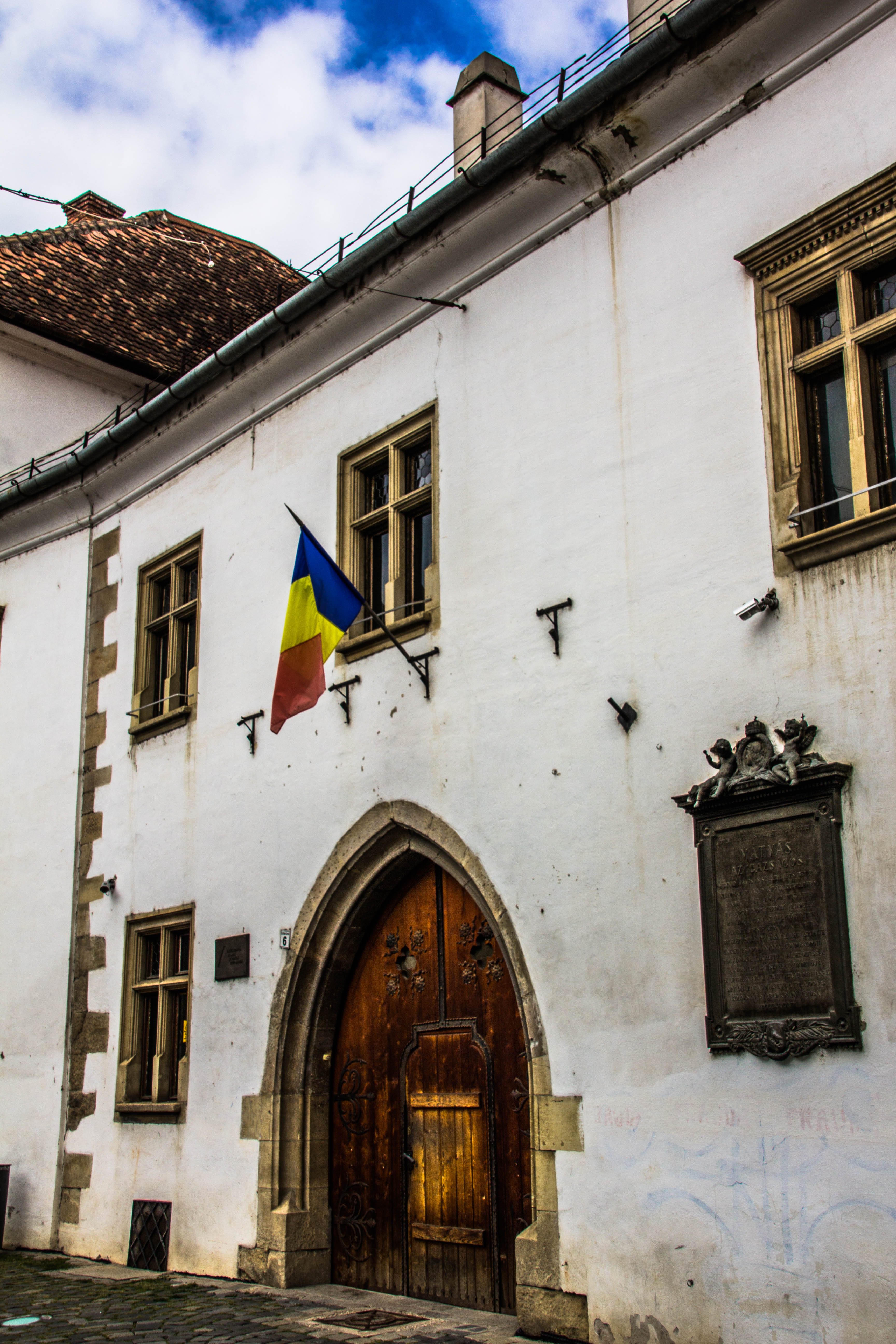 Casa Matei, aparținând de Academia de Arte Vizuale „Ion Andreescu”